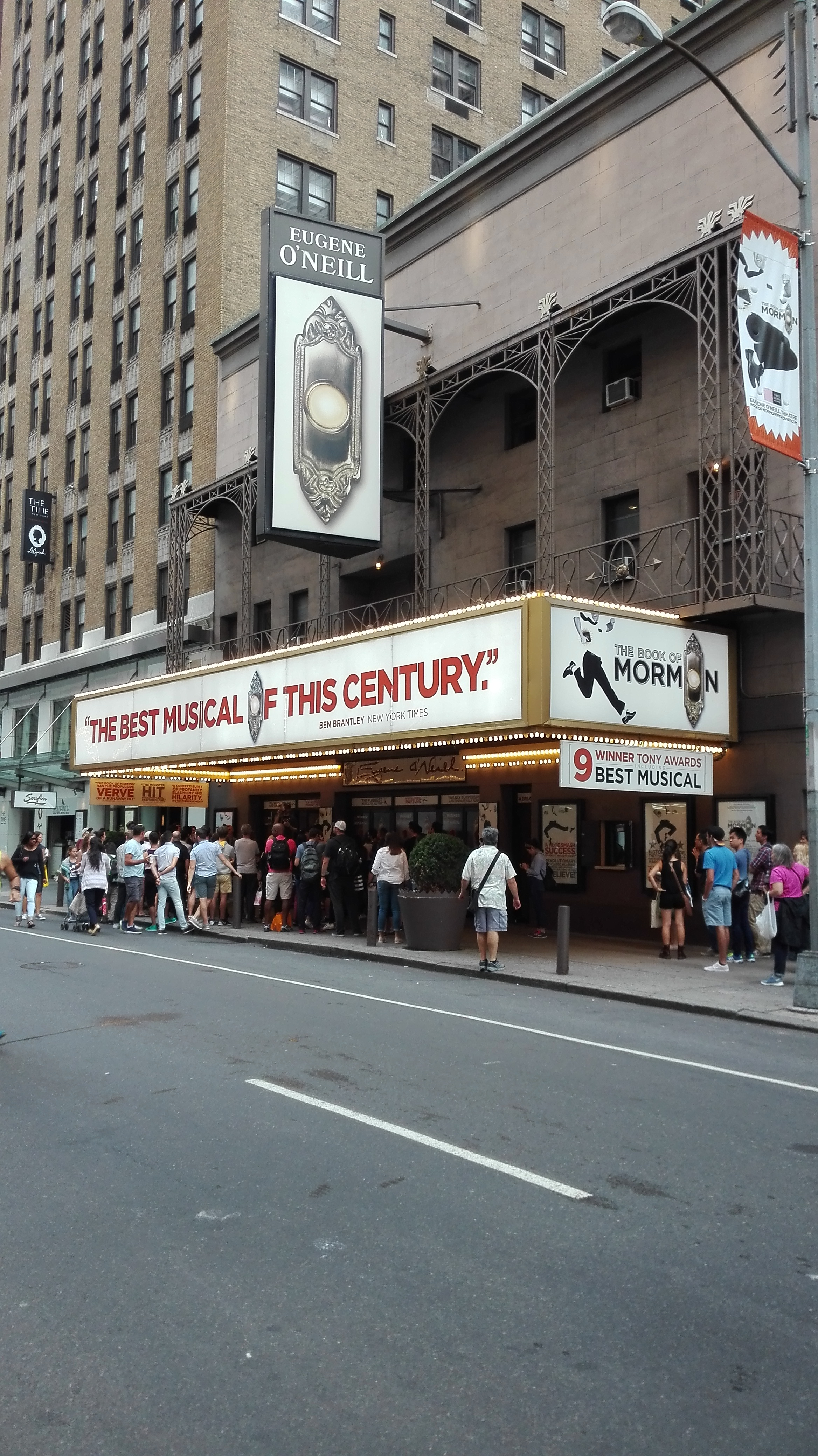 Musical de The book of mormon